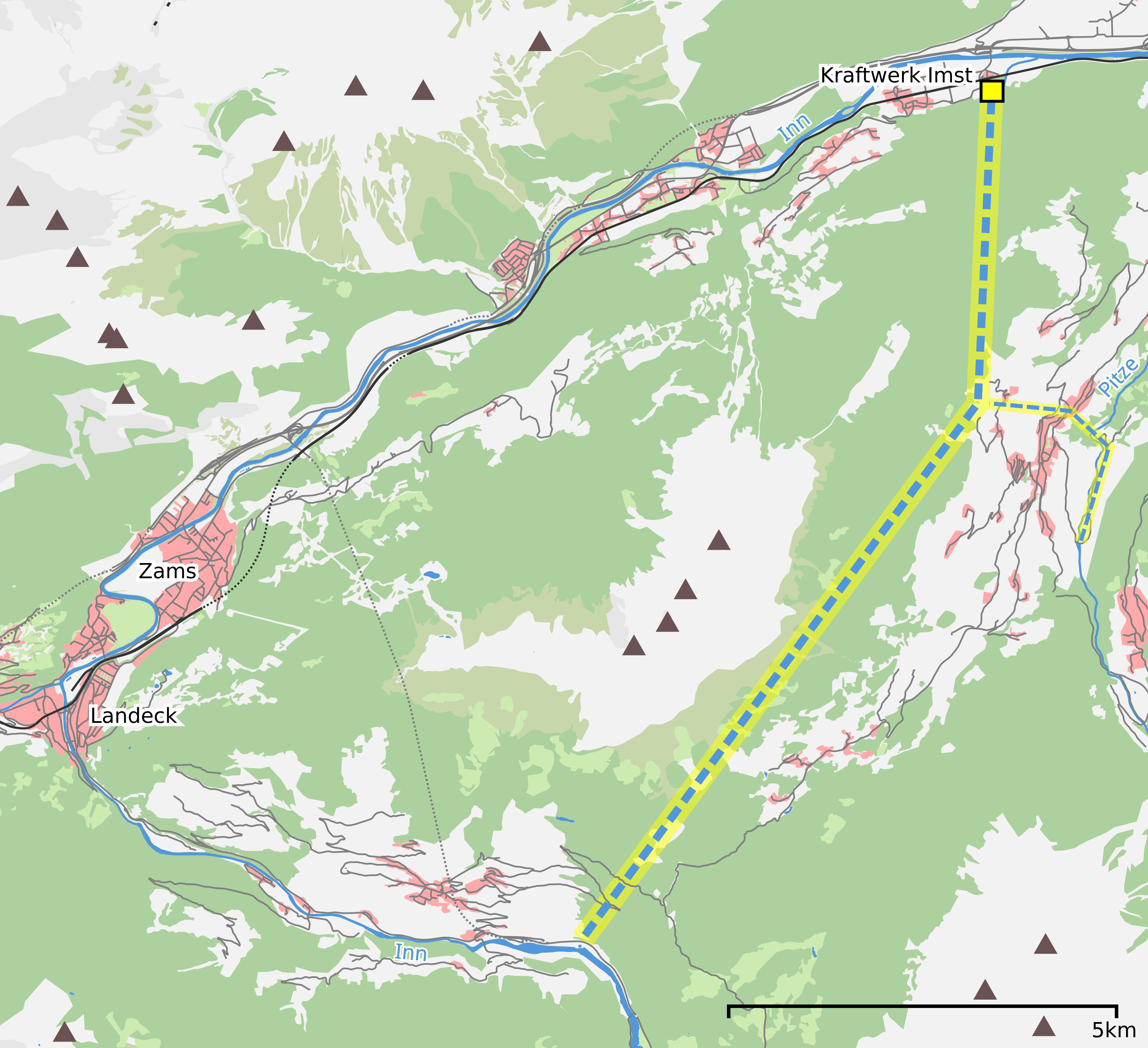 Karte der Anlagen des Kraftwerks Imst